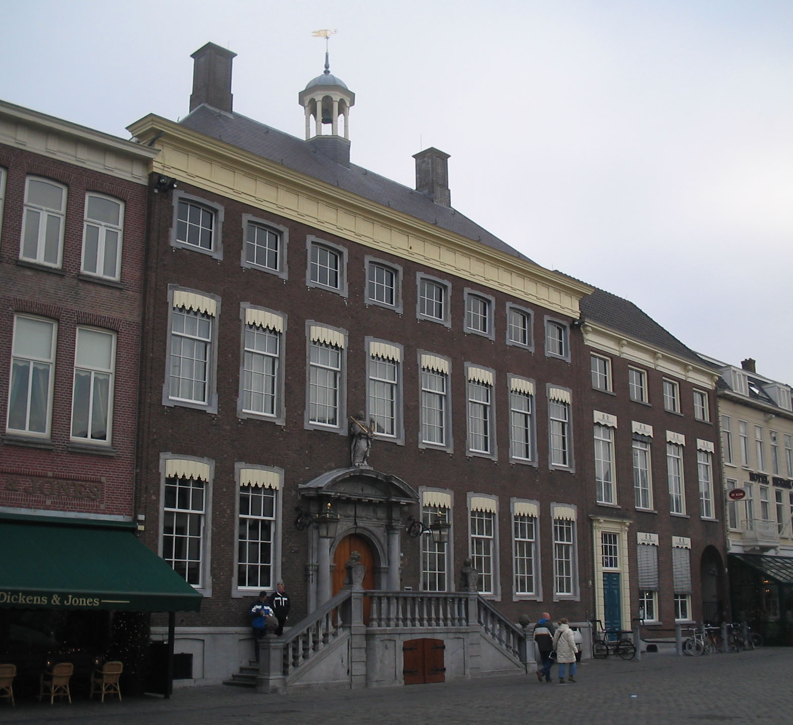 Breda, oude stadhuis